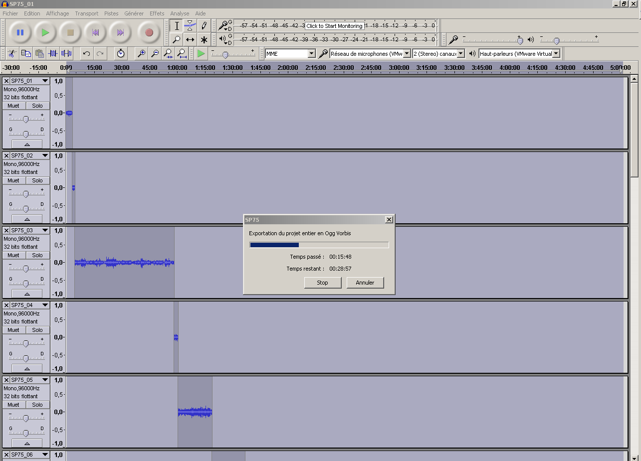 Traitement de données audio aux Archives cantonales jurassiennes